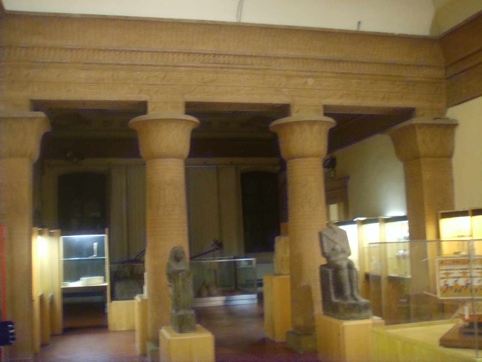 hall Museo_archeologico_di_Firenze Museo_Egizio museum in Florence